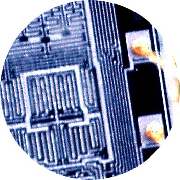 Detail křemíkového čipu paměti EPROM